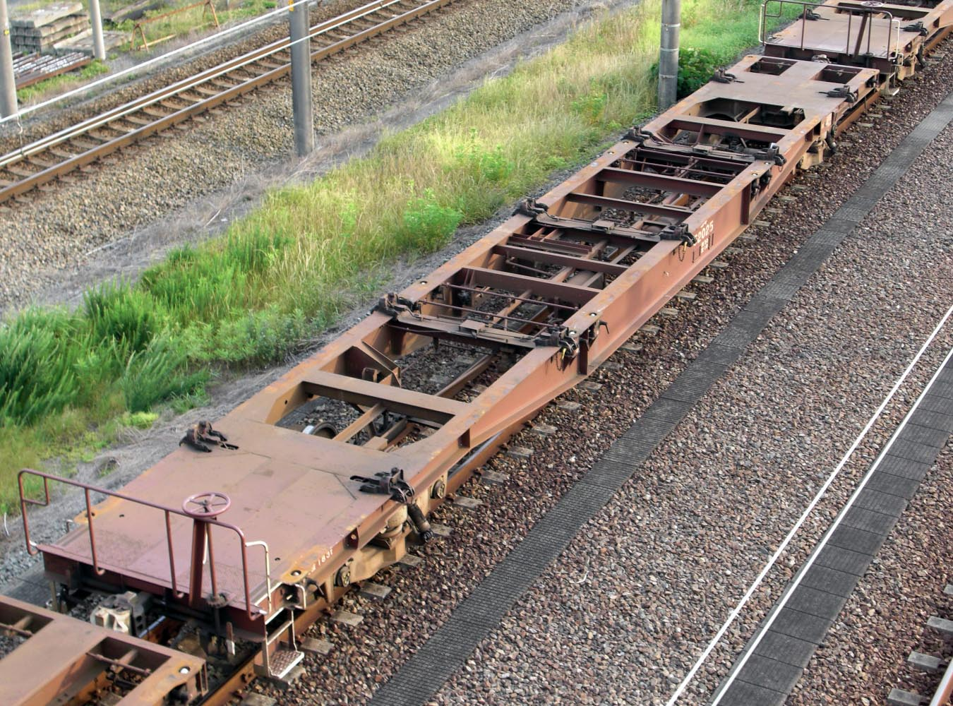 静岡貨物駅に停車中のコキ50000形コンテナ貨車（コキ52025）を跨線橋（公道）から撮影。